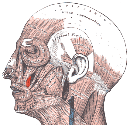 Levator anguli oris muscle